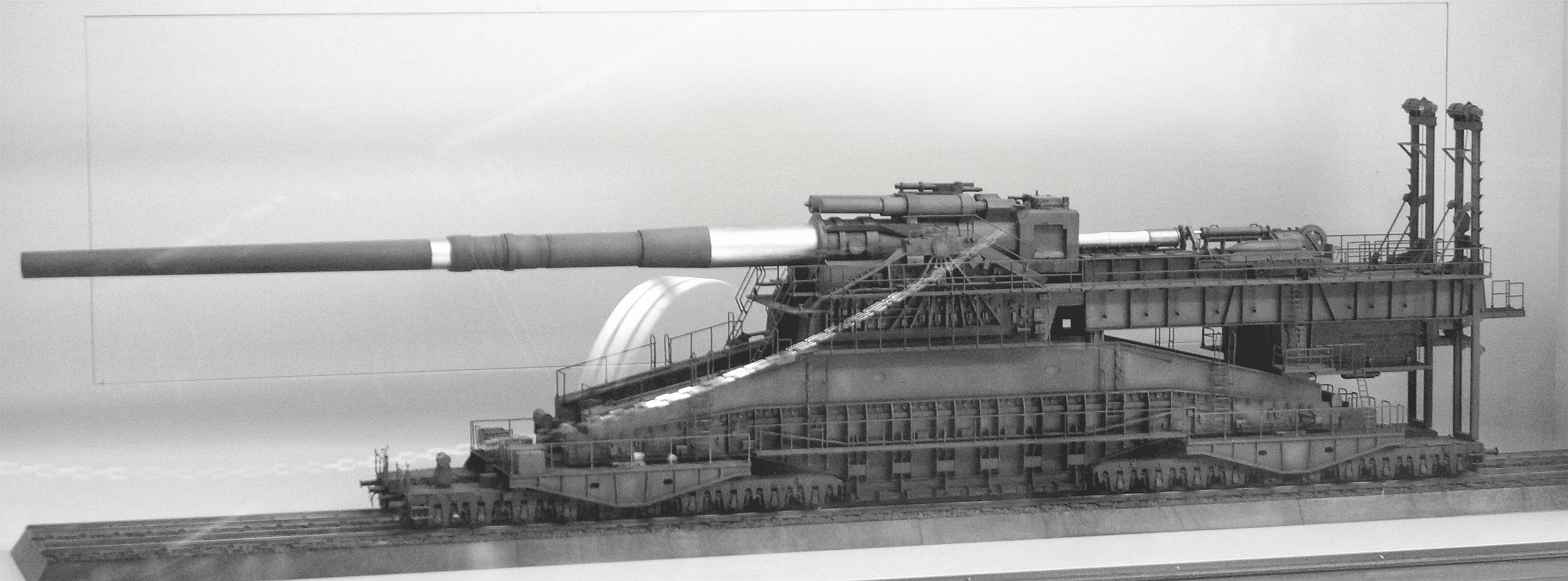 Modell des 80-cm-Eisenbahngeschützes Dora, Museum Overloon